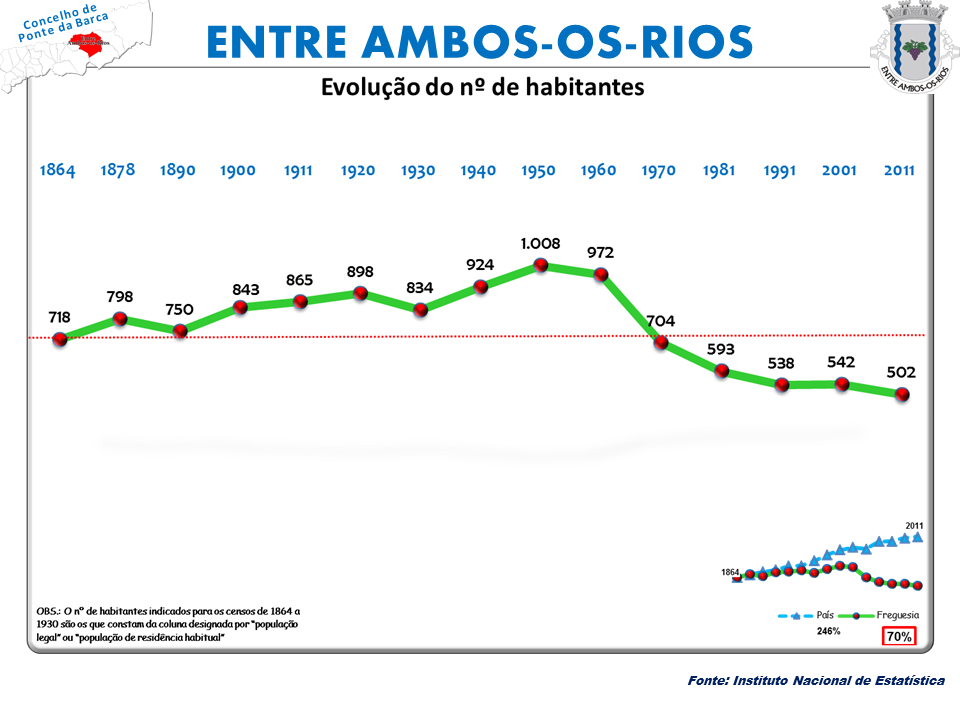 Censos 1864/2011